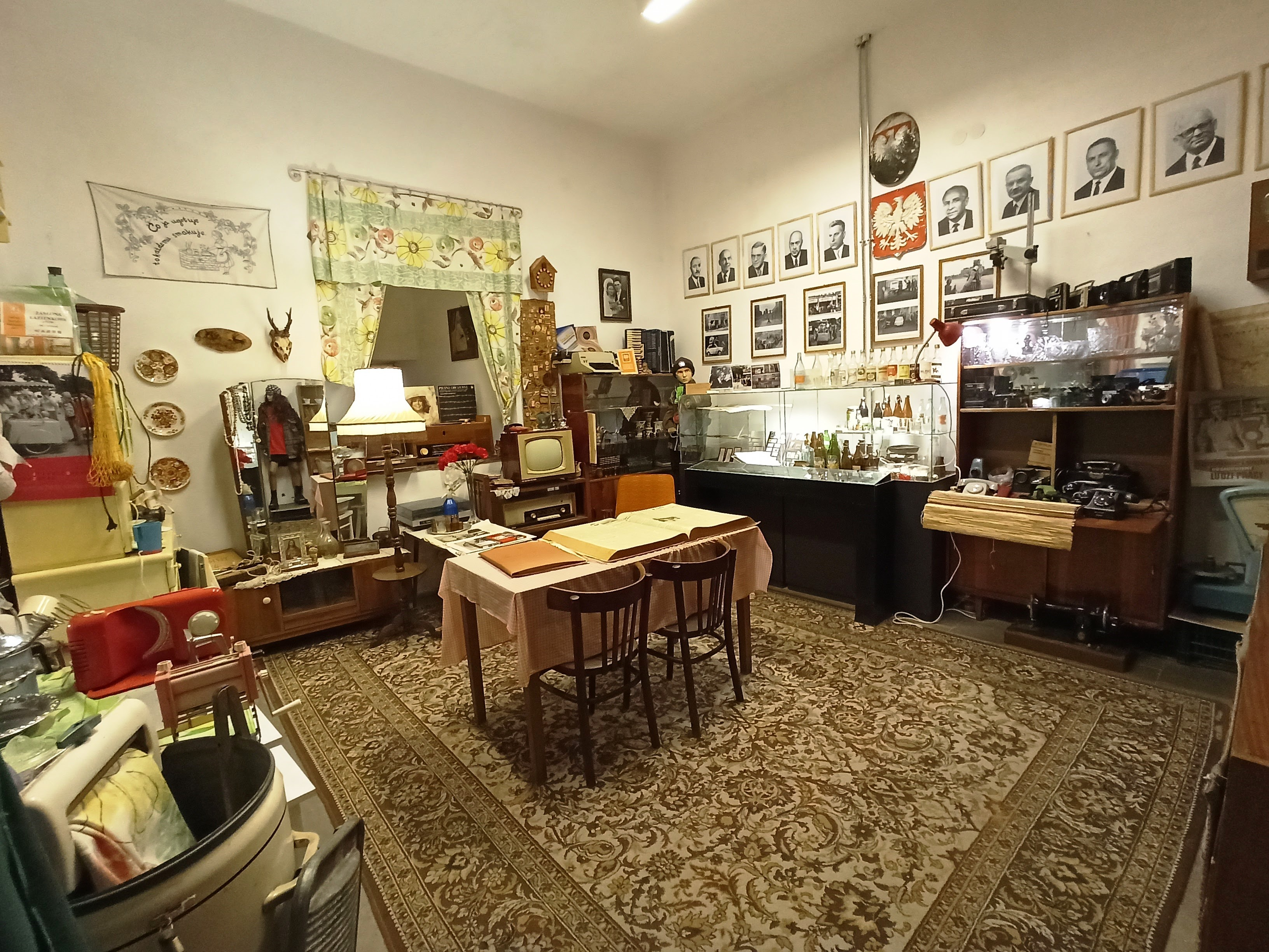 Braniewo Muzeum Ziemi Braniewskiej Wieża Klesza I piętro – Sala Żyliśmy w PRL